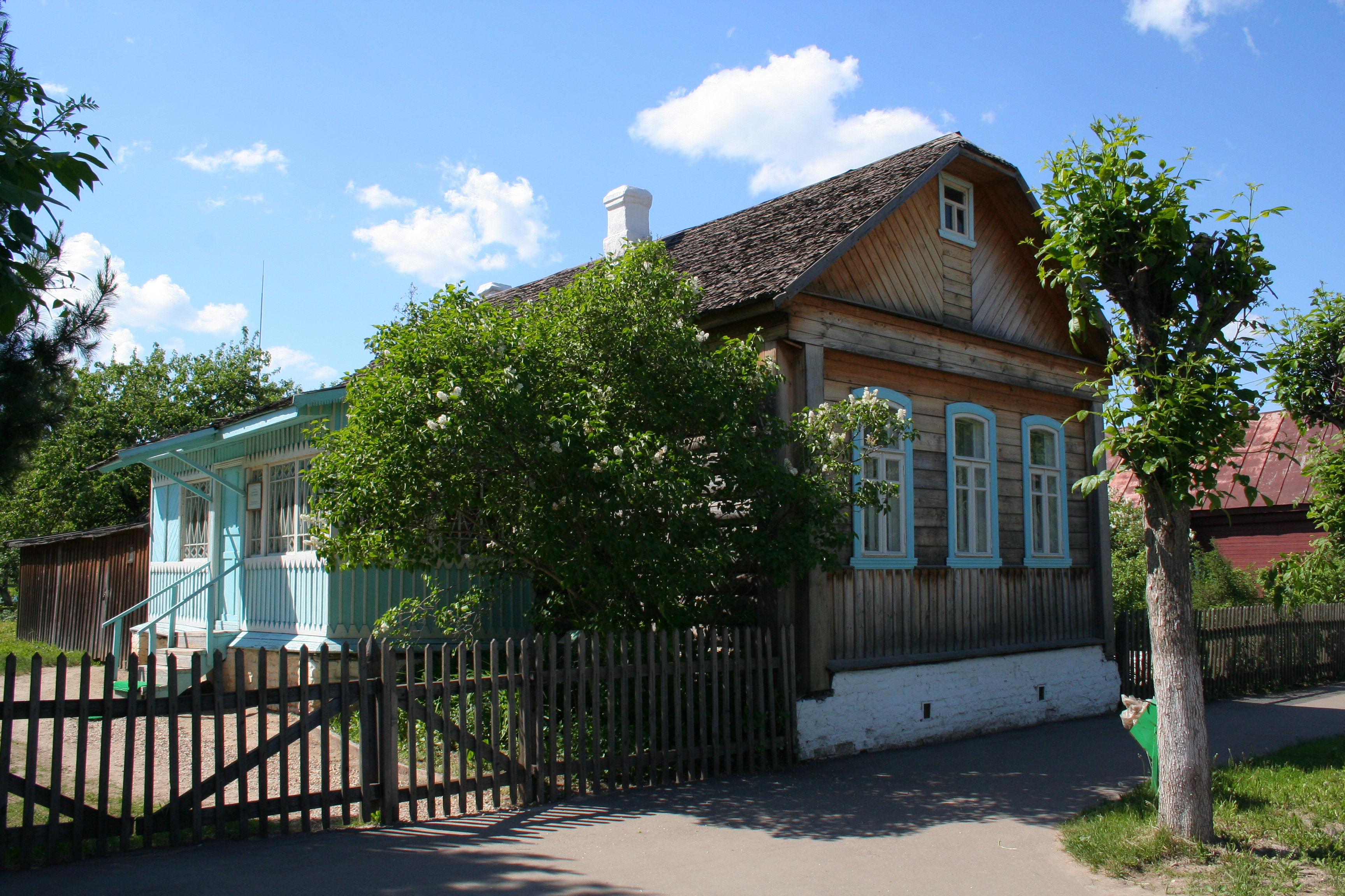 Stadt Gagarin (ehem. Gschatsk), Oblast Smolensk, Russland. Museumskomplex zu Ehren Juri Gagarins. Haus, in dem Gagarin zu seiner Schulzeit lebte.